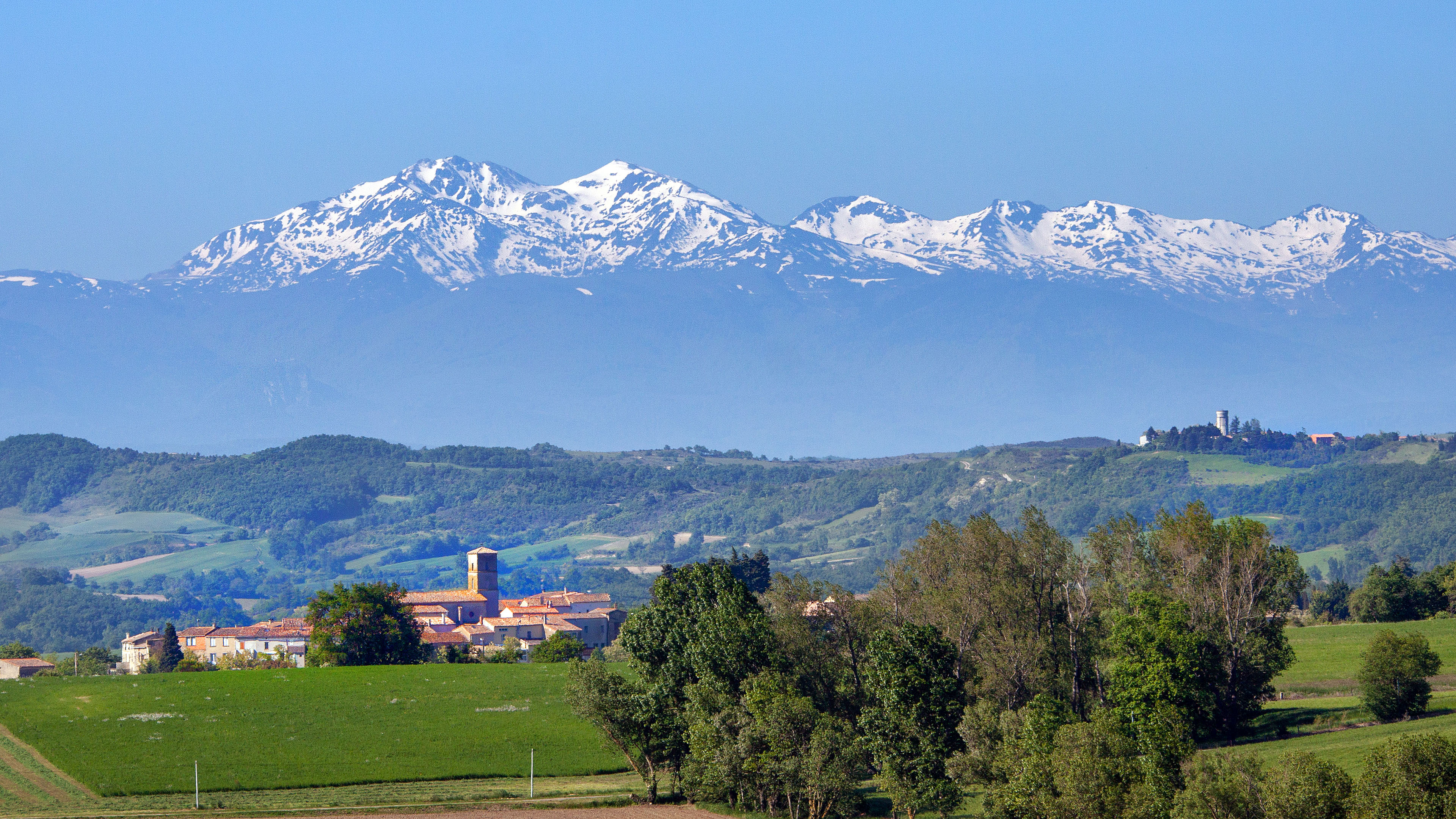 Vue du nord